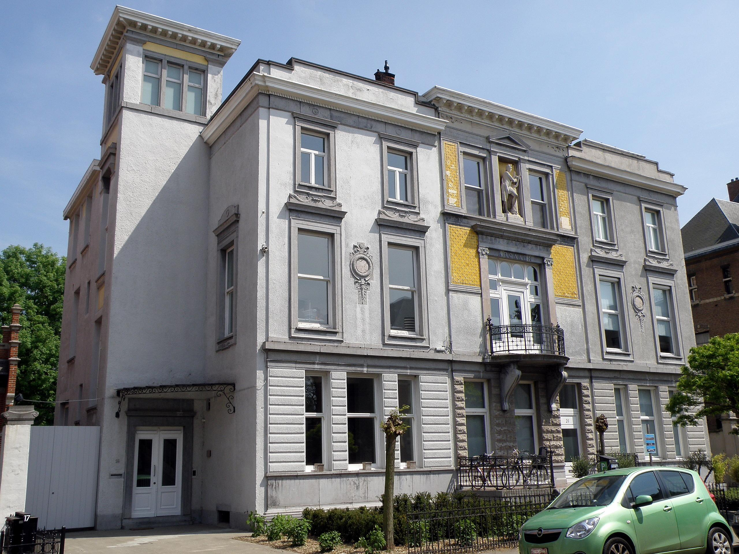 Antwerpen, district Berchem. Wijk Zurenborg. Huis Cogels-Osylei nr. 19-23. Ontwerp van Ernest Stordiau (1894). Vgl. verder Inventaris Bouwkundig Erfgoed.